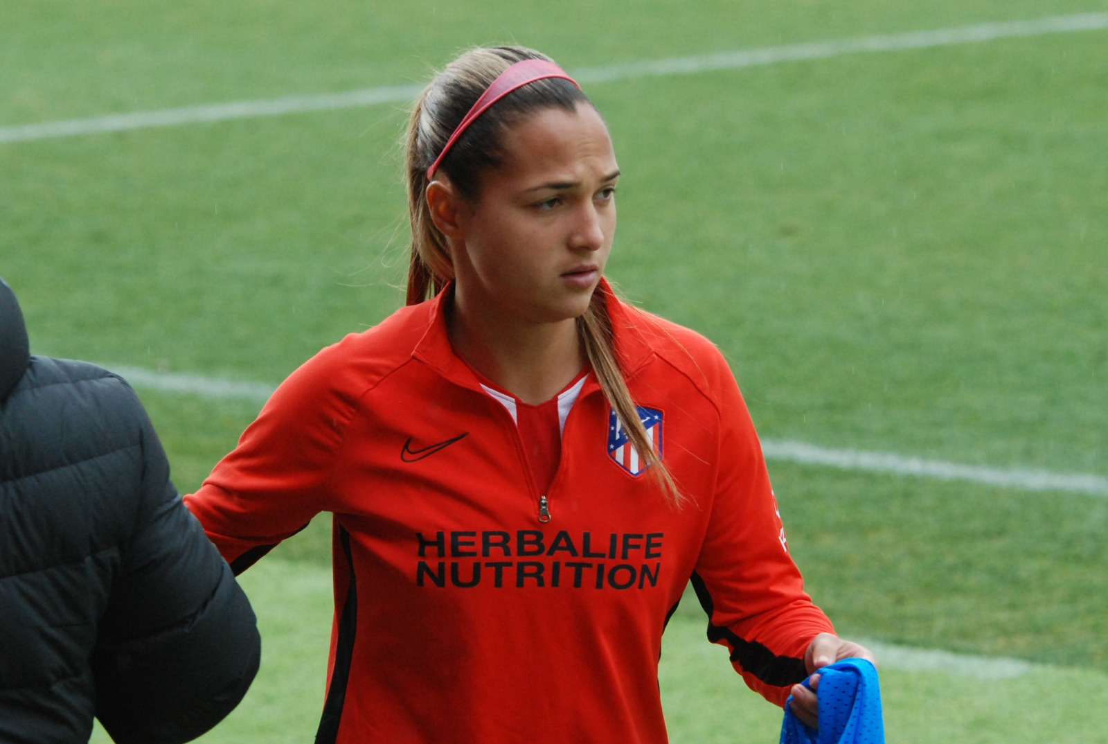 Deyna Castellanos jugando con el Atlético de Madrid frente al Madrid CFF en febrero de 2020